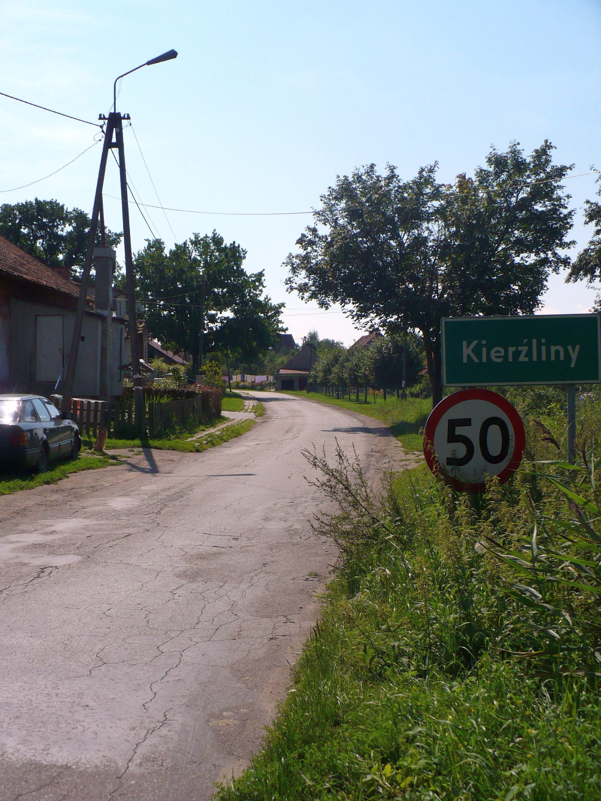 Wieś Kierzliny